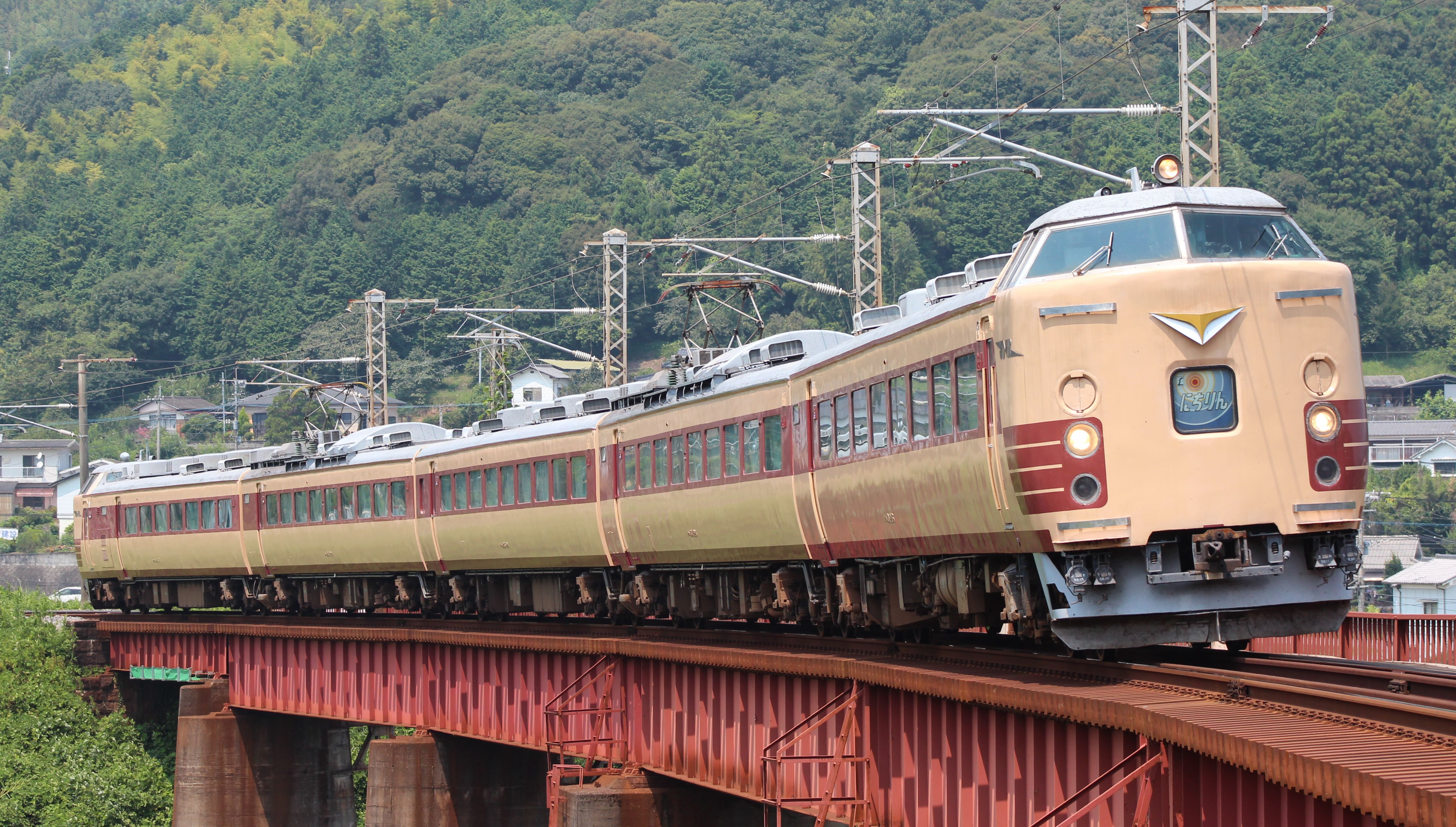 485系 特急にちりん